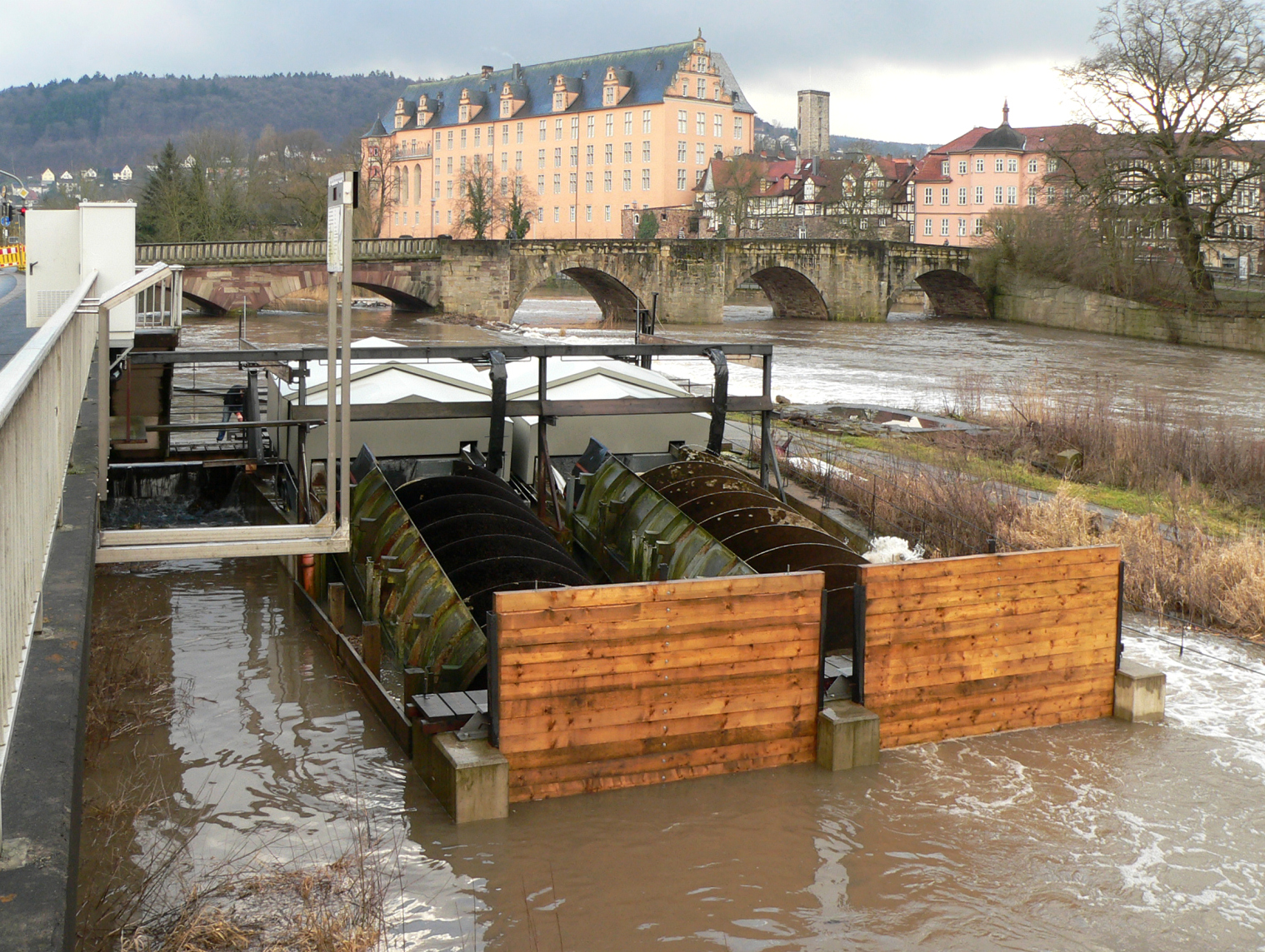 Wasserkraftwerk Blume